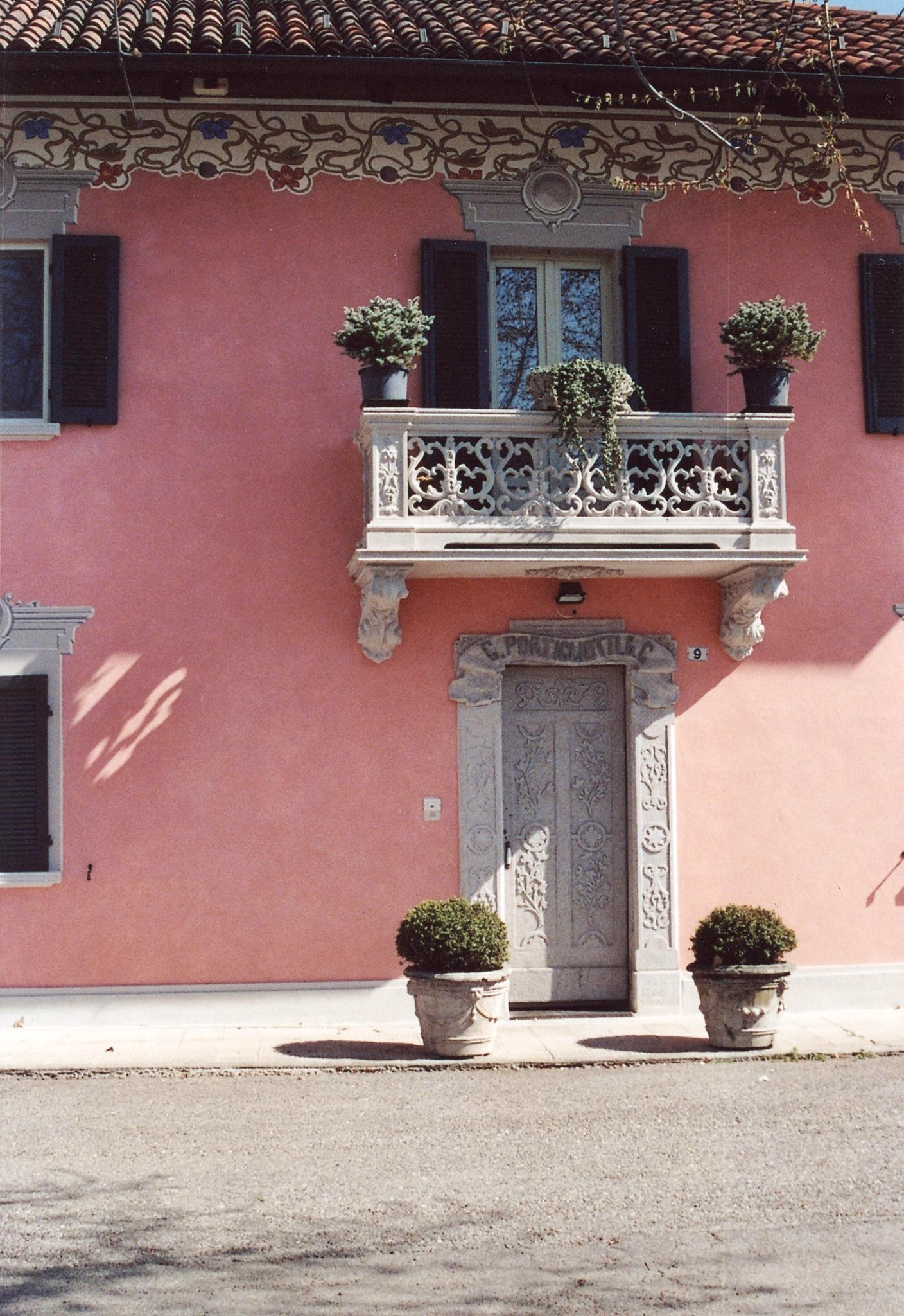 Fara Novarese (NO), Casa Portigliotti, particolare della facciata.